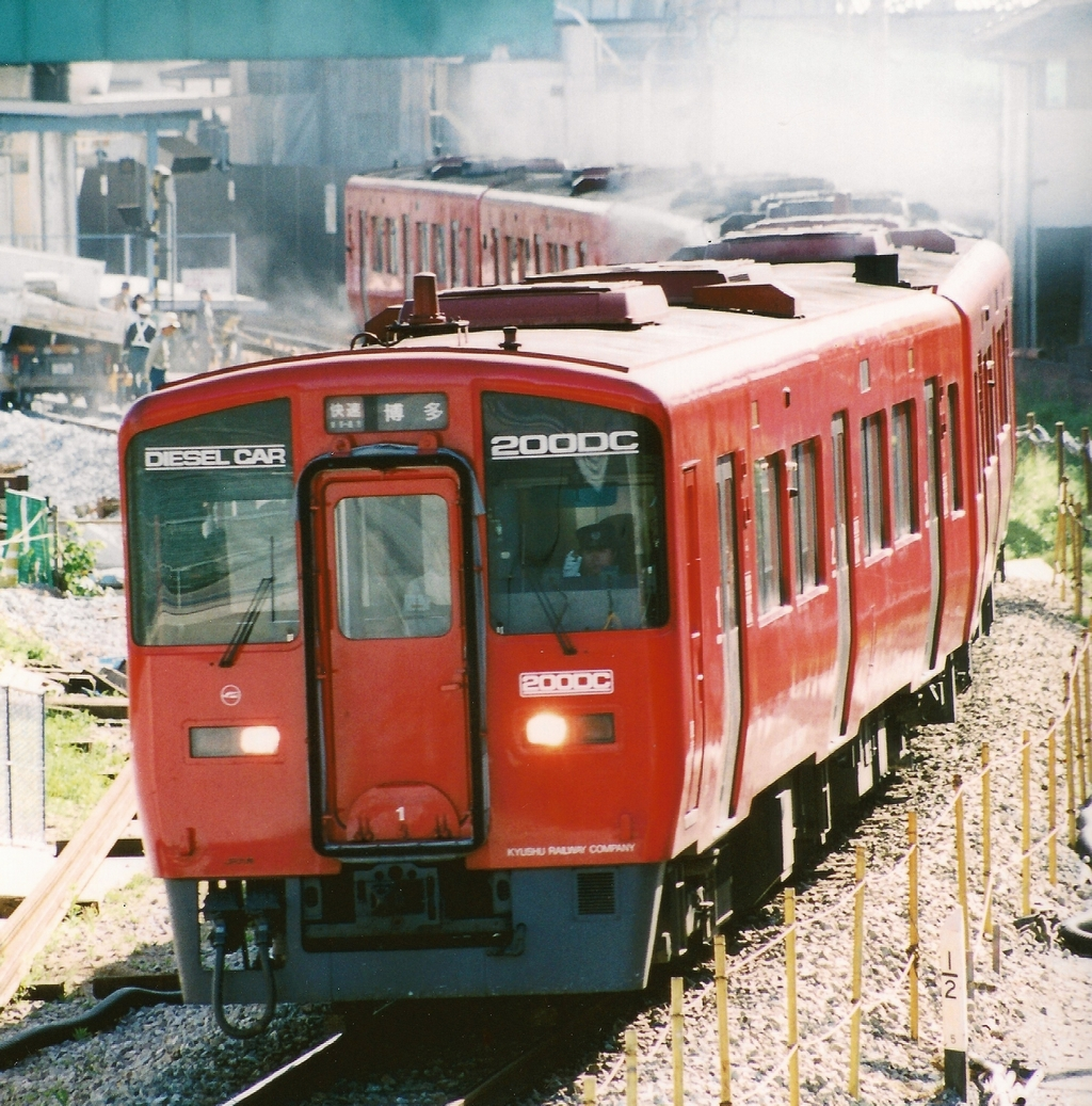 JR九州キハ200系の画像。二線化工事中の篠栗線長者原駅にて。2001年頃撮影の写真をスキャナで取り込みました。 私（撮影者：jihara19）はおんぷちゃんねる鉄道画像掲示板にも本画像の派生画像を投稿しておりました。現在は削除しております。無断転載ではございませんのでよろしくお願いいたします。